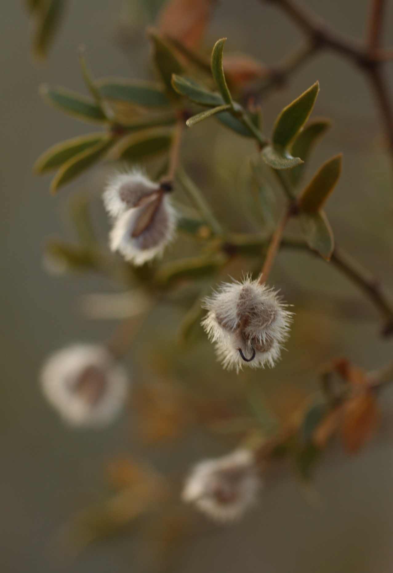 Creosote fruit